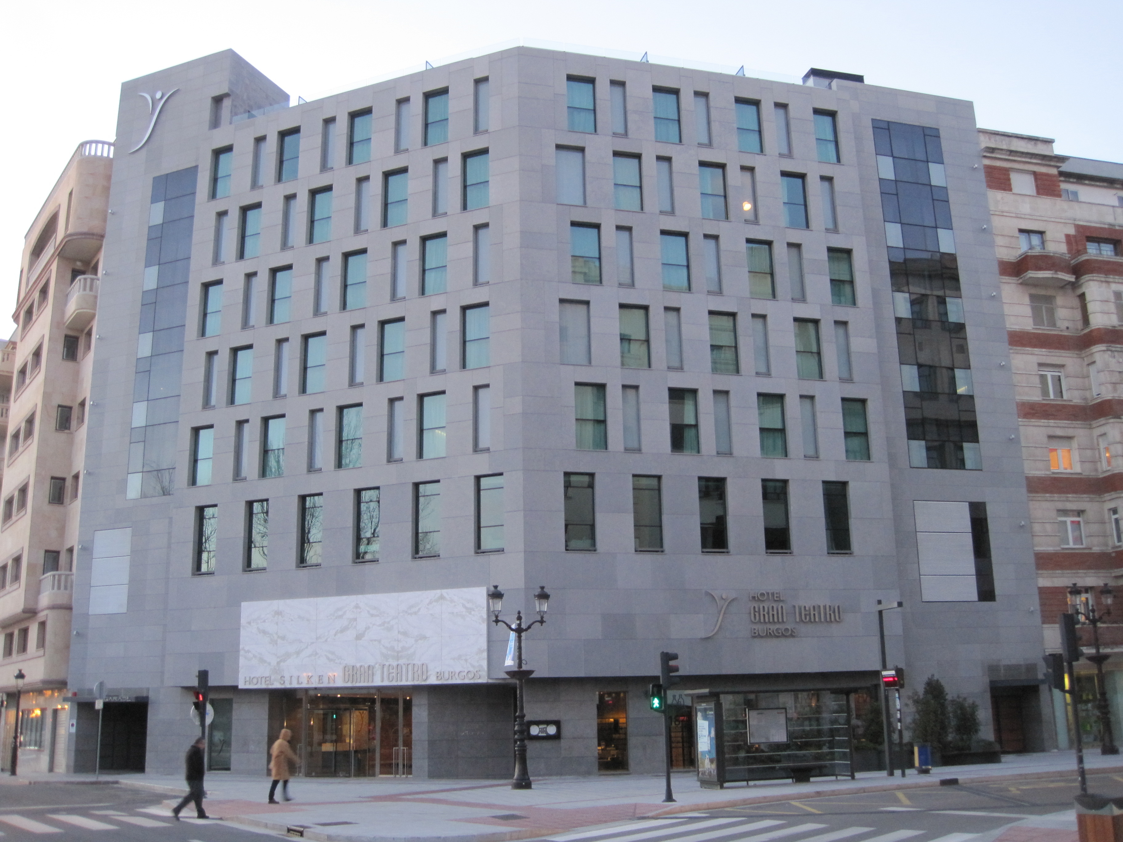 Hotel Silken de Burgos, situado cerca del Museo de la Evolución Humana.